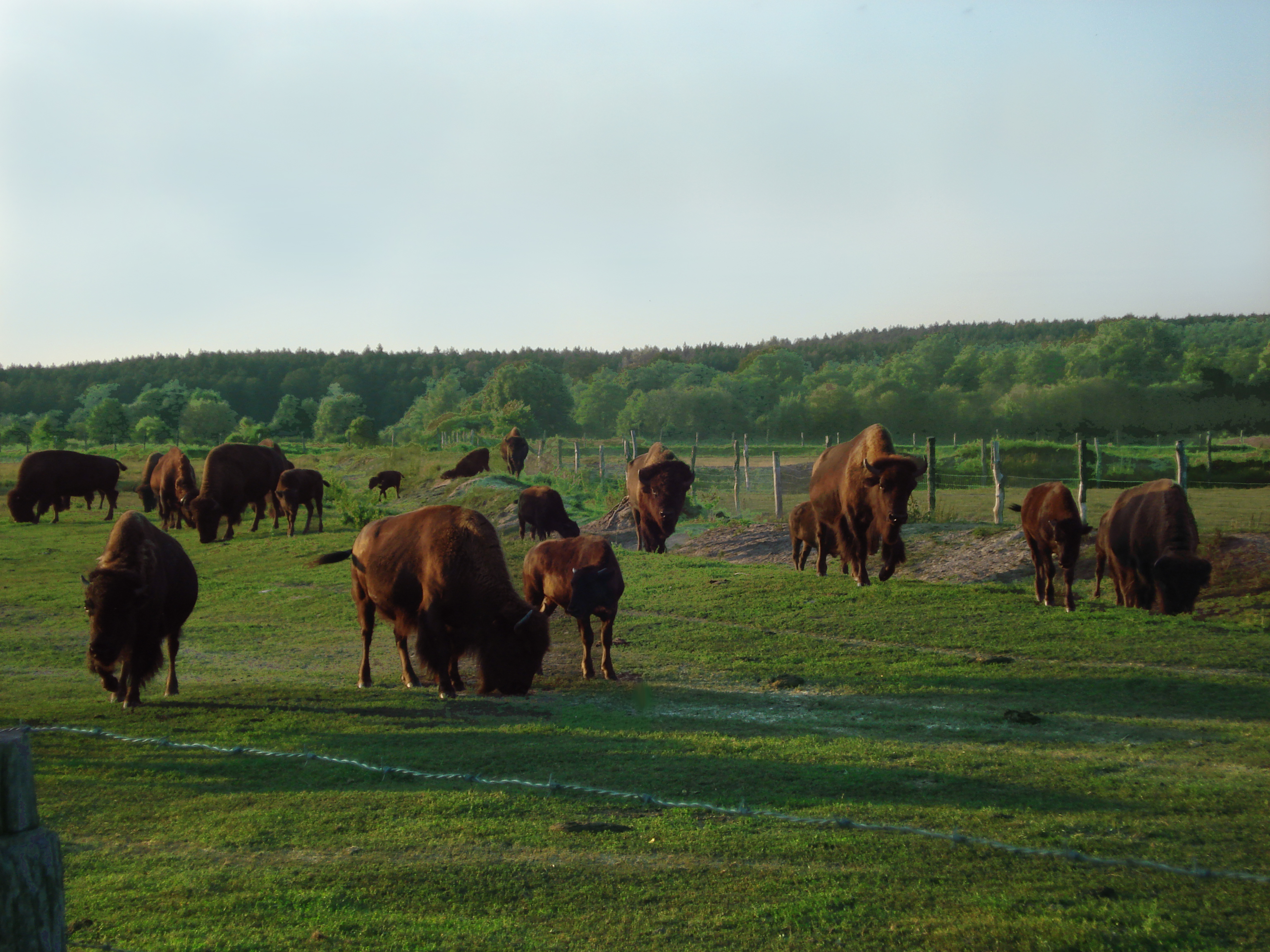 Bizony